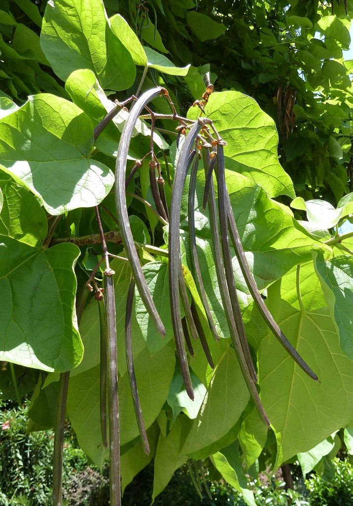 Catalpa bignonioides : Frutos, todavía no del todo maduros - Parque de la Quinta de la Fuente del Berro, calle del Alcalde Saínz de Baranda, Madrid (España).